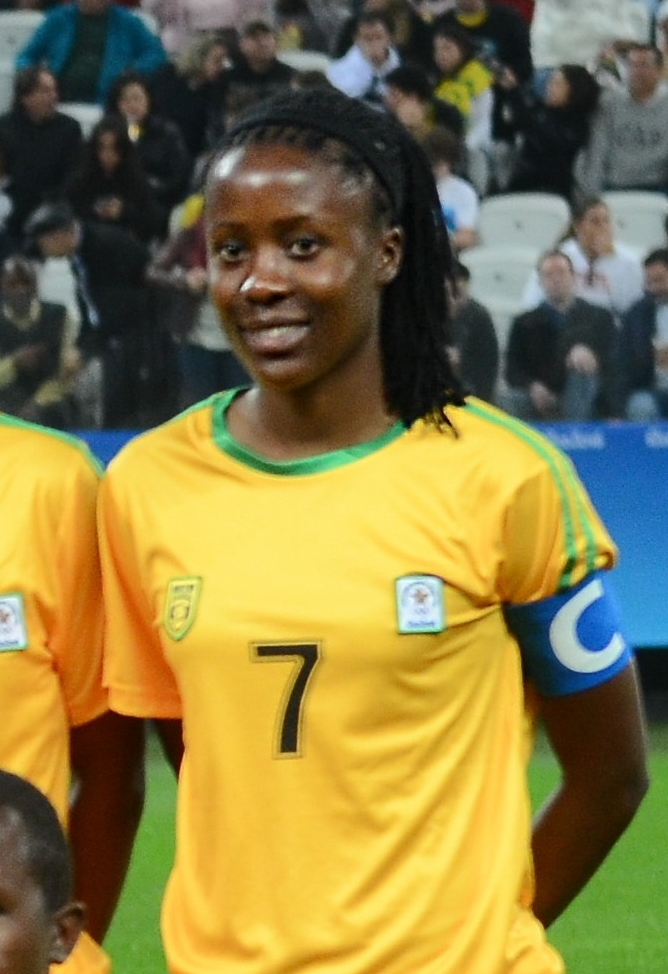 São Paulo - Seleções femininas do Zimbábue e da Alemanha se enfrentam na Arena Corinthians (Rovena Rosa/Agência Brasil)